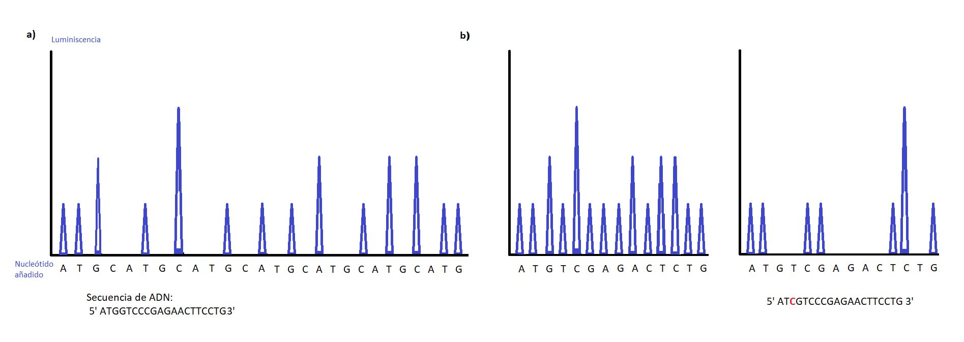 Ejemplo de pirograma. a) Pirograma en el que se ha secuenciado un fragmento de ADN sin conocer previamente la secuencia introduciendo por orden los nucleótidos. b) Pirograma de un fragmento de ADN que añade los nucleótidos ya conocidos en el mismo orden que la secuencia, sirve para encontrar SNPs como el cambio de una G por una C en el gráfico de la derecha.